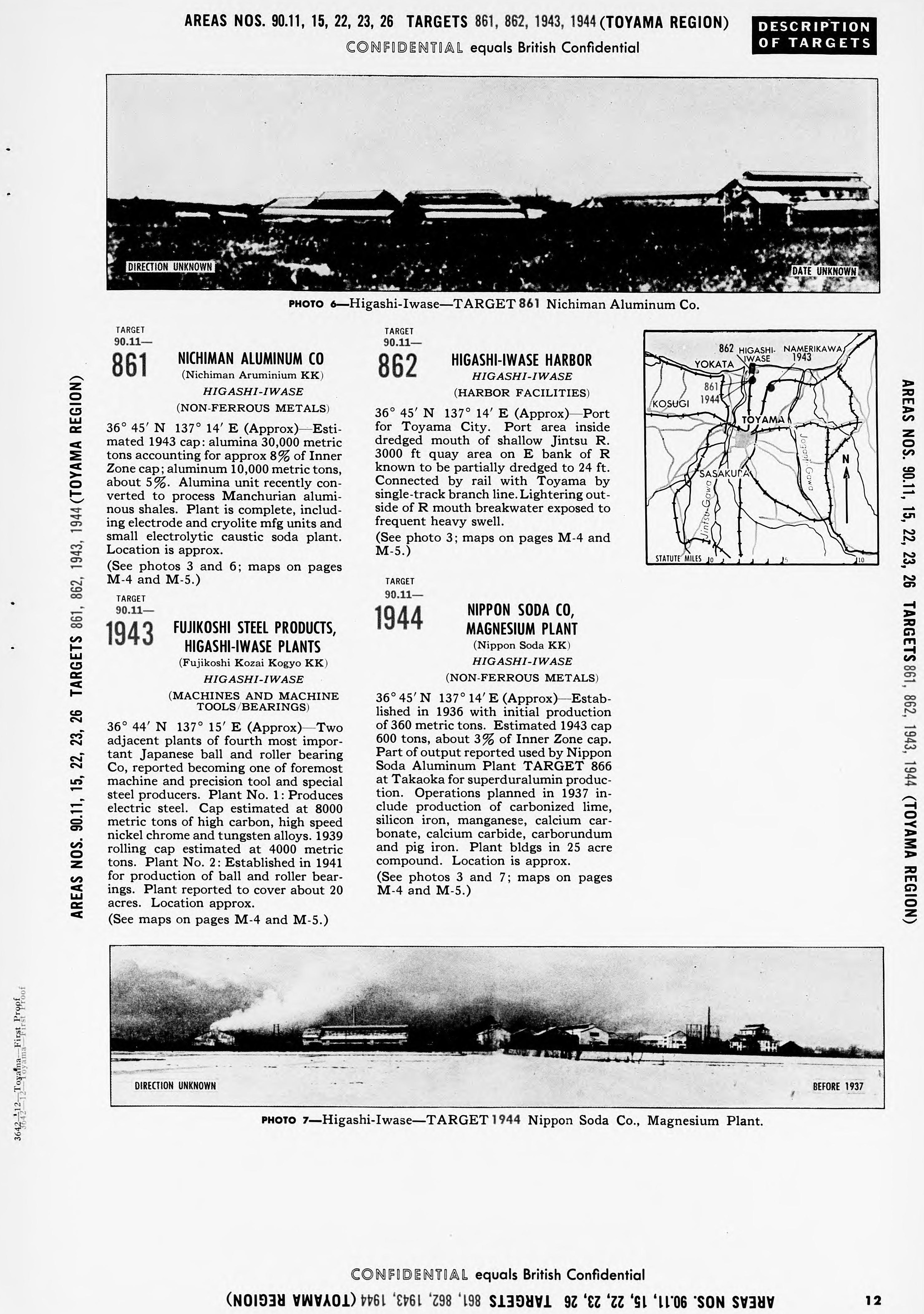 米国戦略爆撃調査団の目標情報に挙げられている富山県